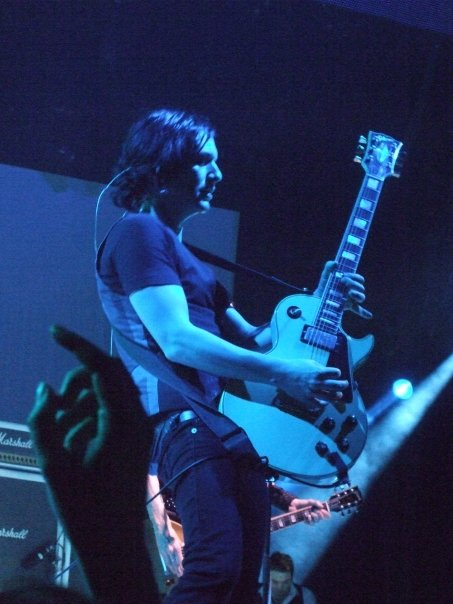 Photos de Brian Molko lors du concert de Placebo le 7/11/09 à Lyon